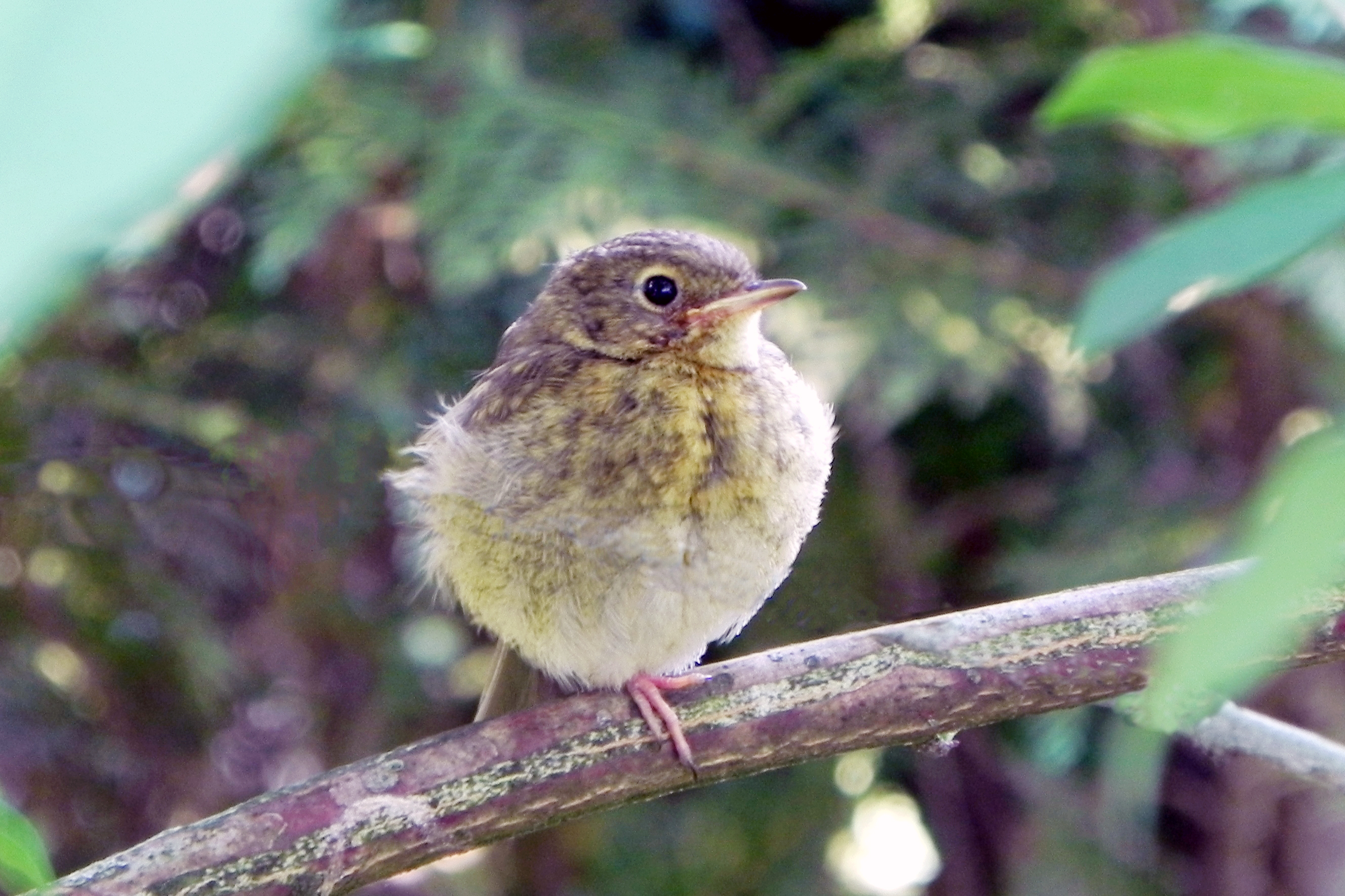 ganz junges Rotkehlchen-Küken